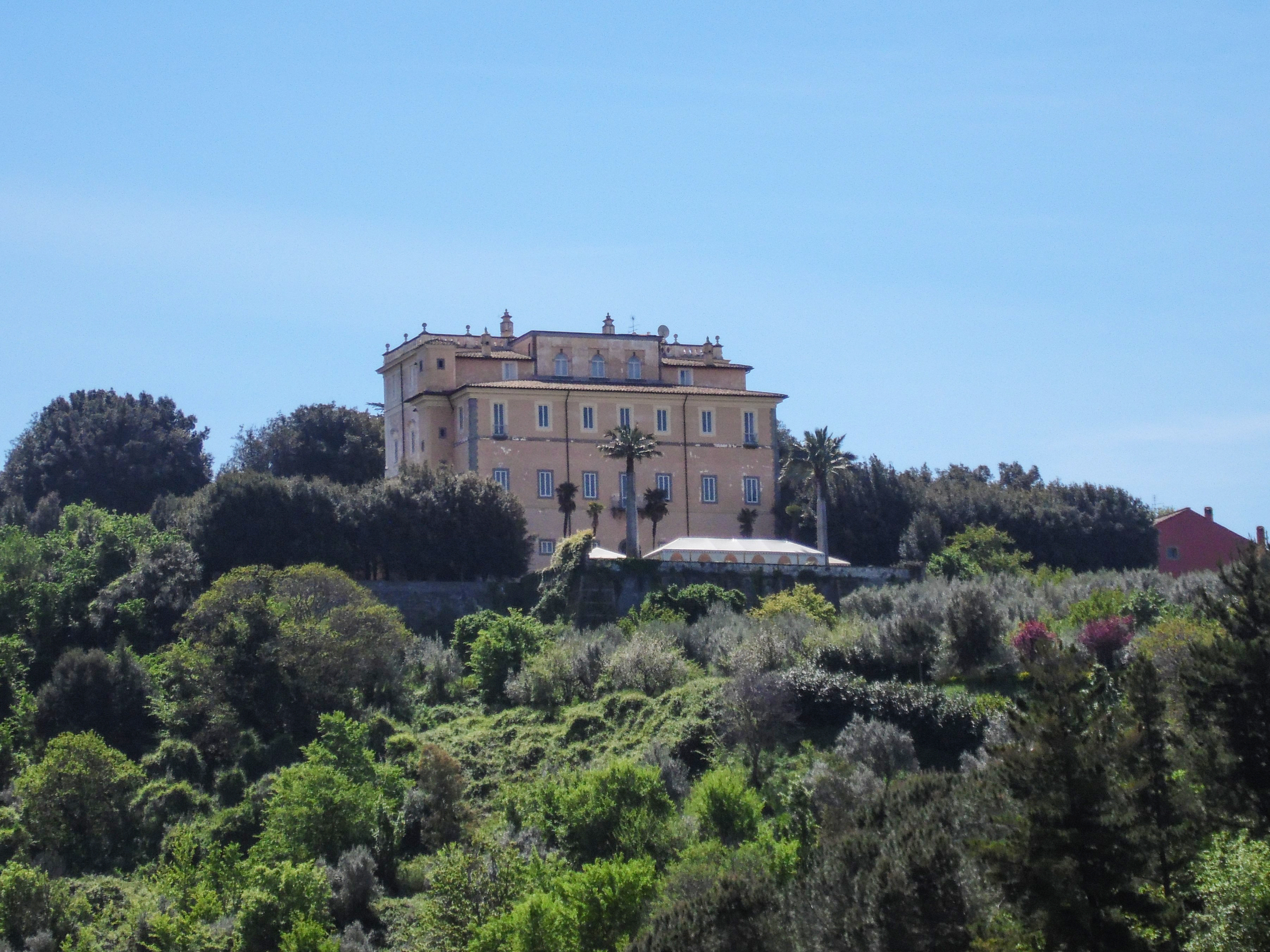 Die ländliche Villa Grazioli ist eine denkmalgeschützte Villa mit Garten in dem Ort Grottaferrata, Region Latium nahe Rom in Italien. Sie ist ein Bauwerk der Renaissance und wurde um 1580 von Kardinal Antonio Carafa errichtet.